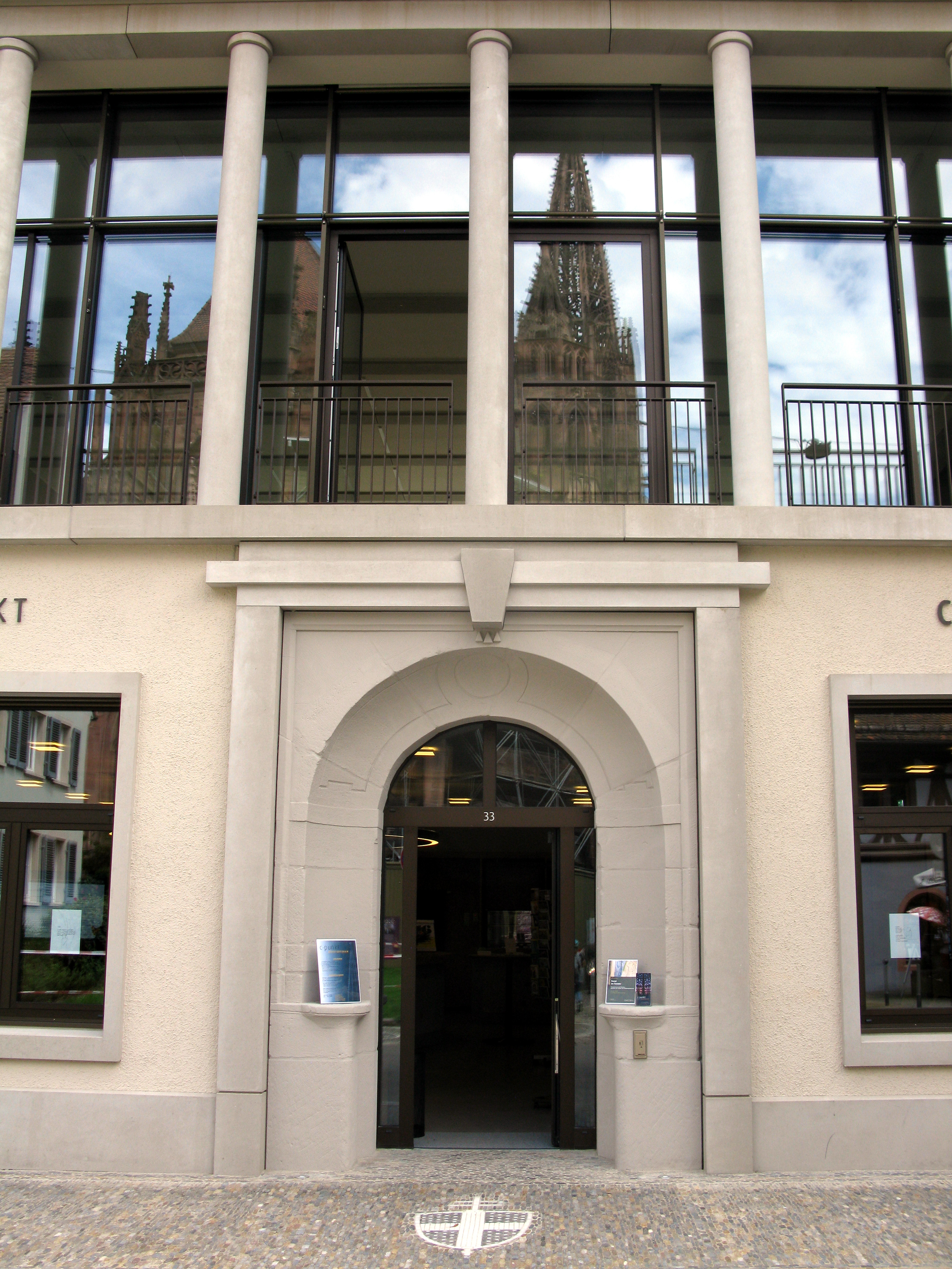 Neubau des Andlauschen Hauses in Freiburg mit Spiegelung des Münsters